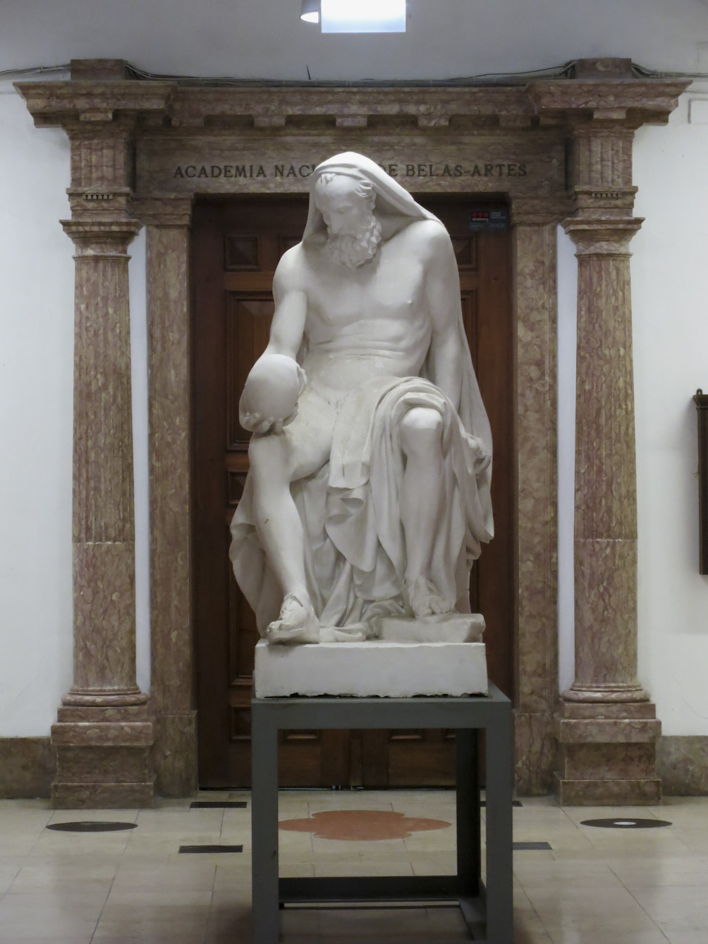 Piso de entrada da Faculdade de Belas-Artes da Universidade de Lisboa; ao fundo, entrada para a Academia Nacional de Belas Artes